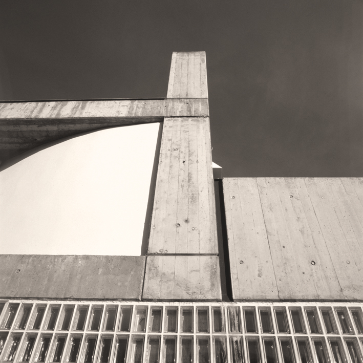 Wohn- und Lagerhaus Hoffmann, Neurum (A)